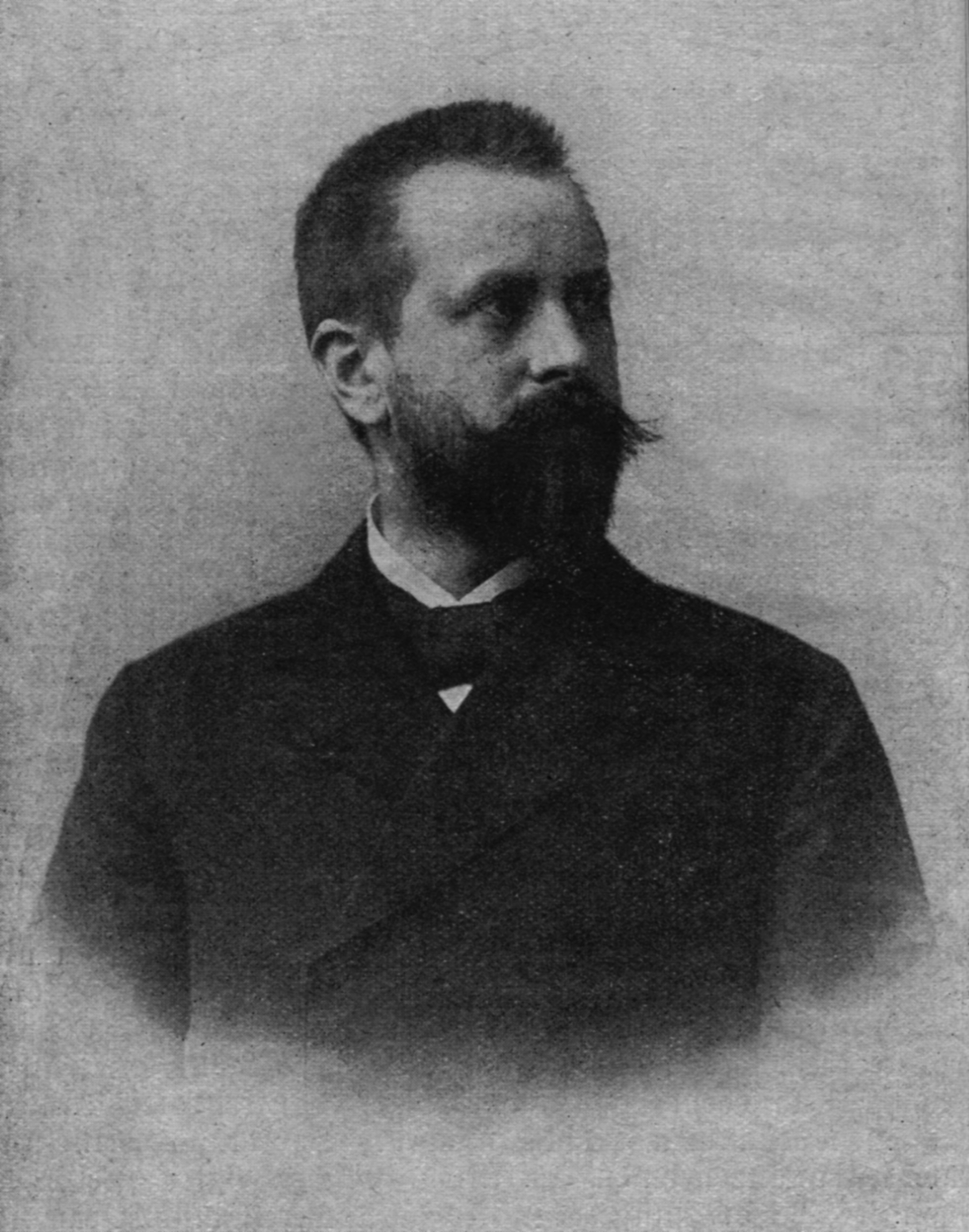 Porträt von Ludwig Noster, entnommen dem Heimatkalender für den Kreis Friedeberg 1918